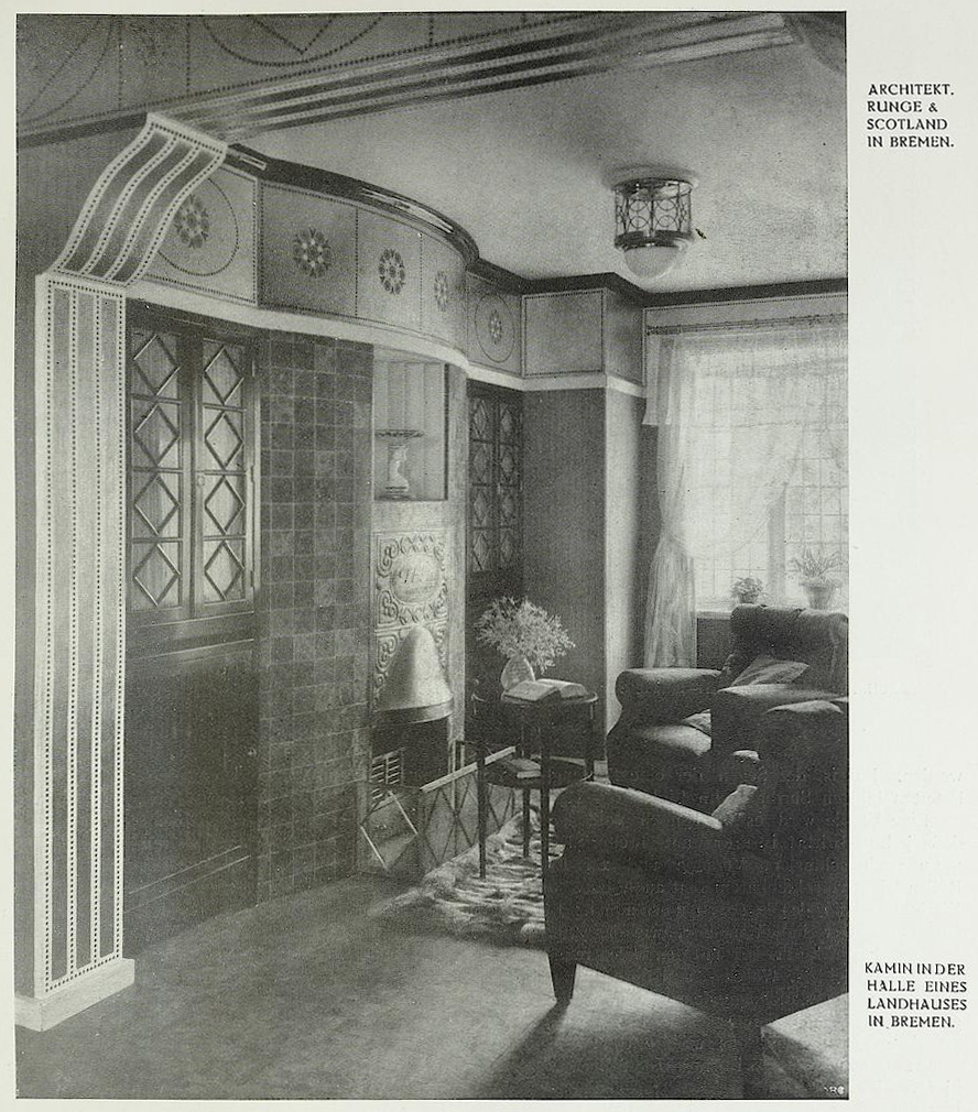 Landhaus Theodor Herbst, Kaminzimmer, 1908-1909 von Runge und Scotland